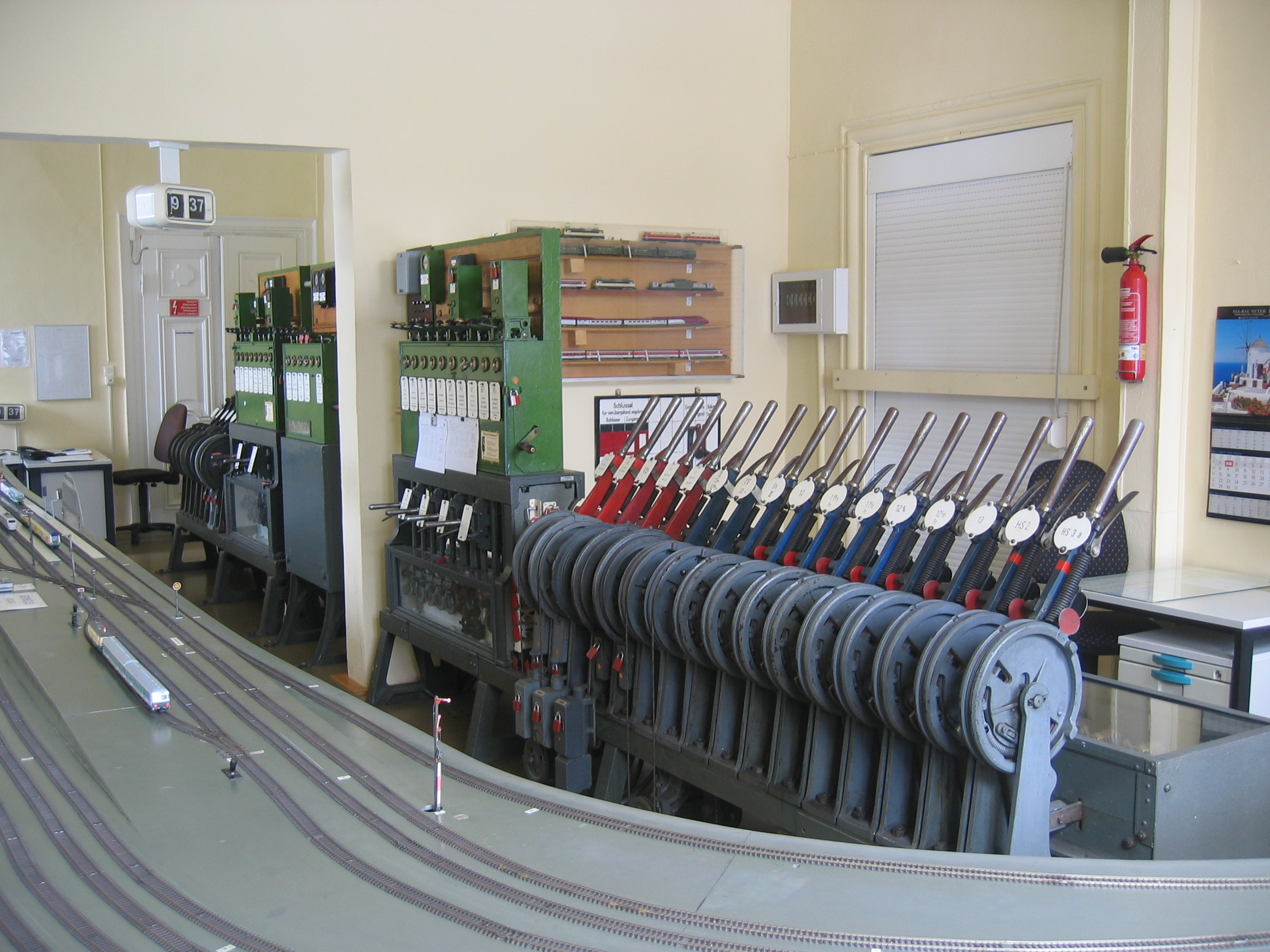 Zu sehen ist Bahnhof Schönhausen. Im Hintergrund die Blockanlagen und Weichen- und Signalhebel, Bauform Jüdel, im Vordergrund der zugehörige teil der Modellbahn.